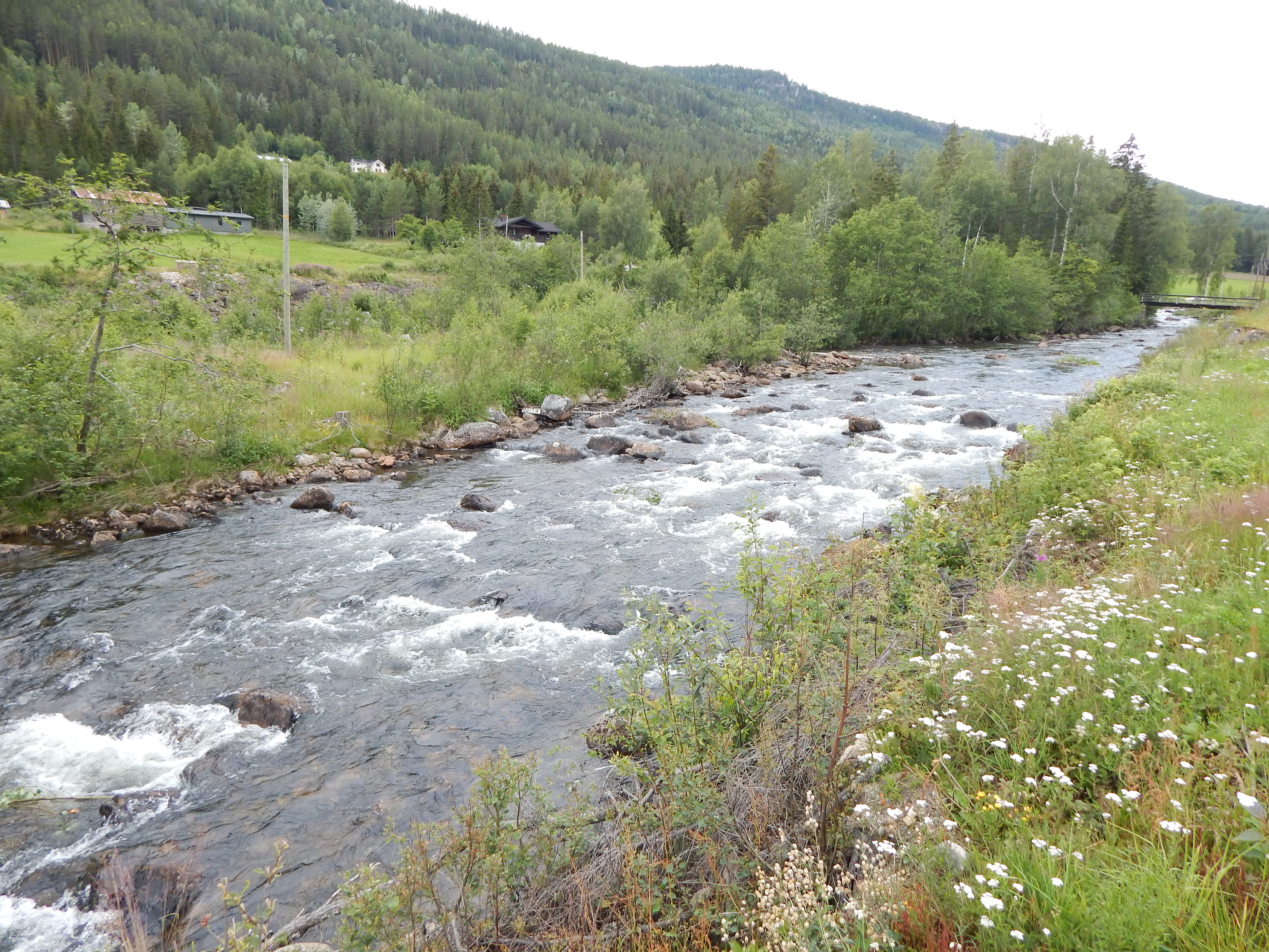 Austbygdåe like ved Austbygde kirke